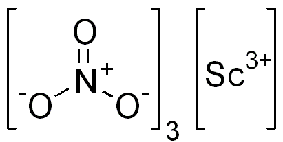 chemical structure of scandium nitrate